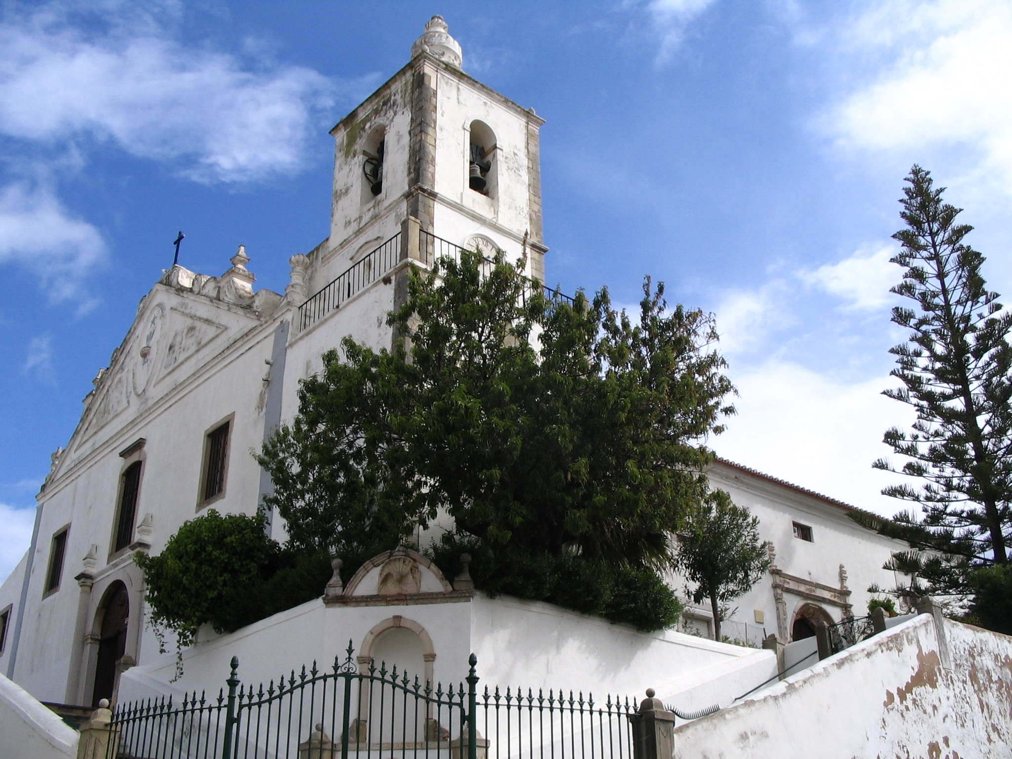 Igreja de San Sebastiao, Lagos, Portugal